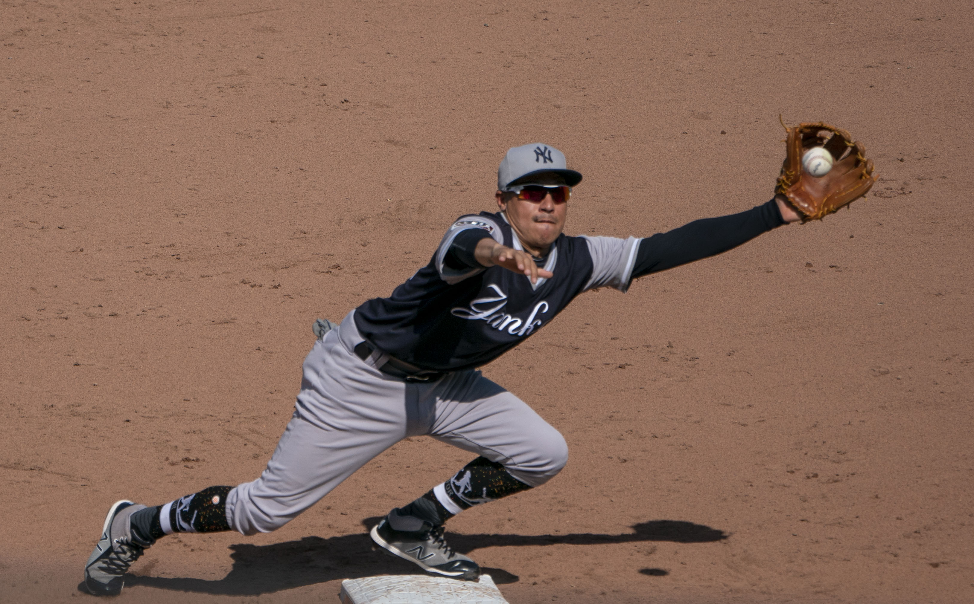 Yankees at Orioles 8/25/18